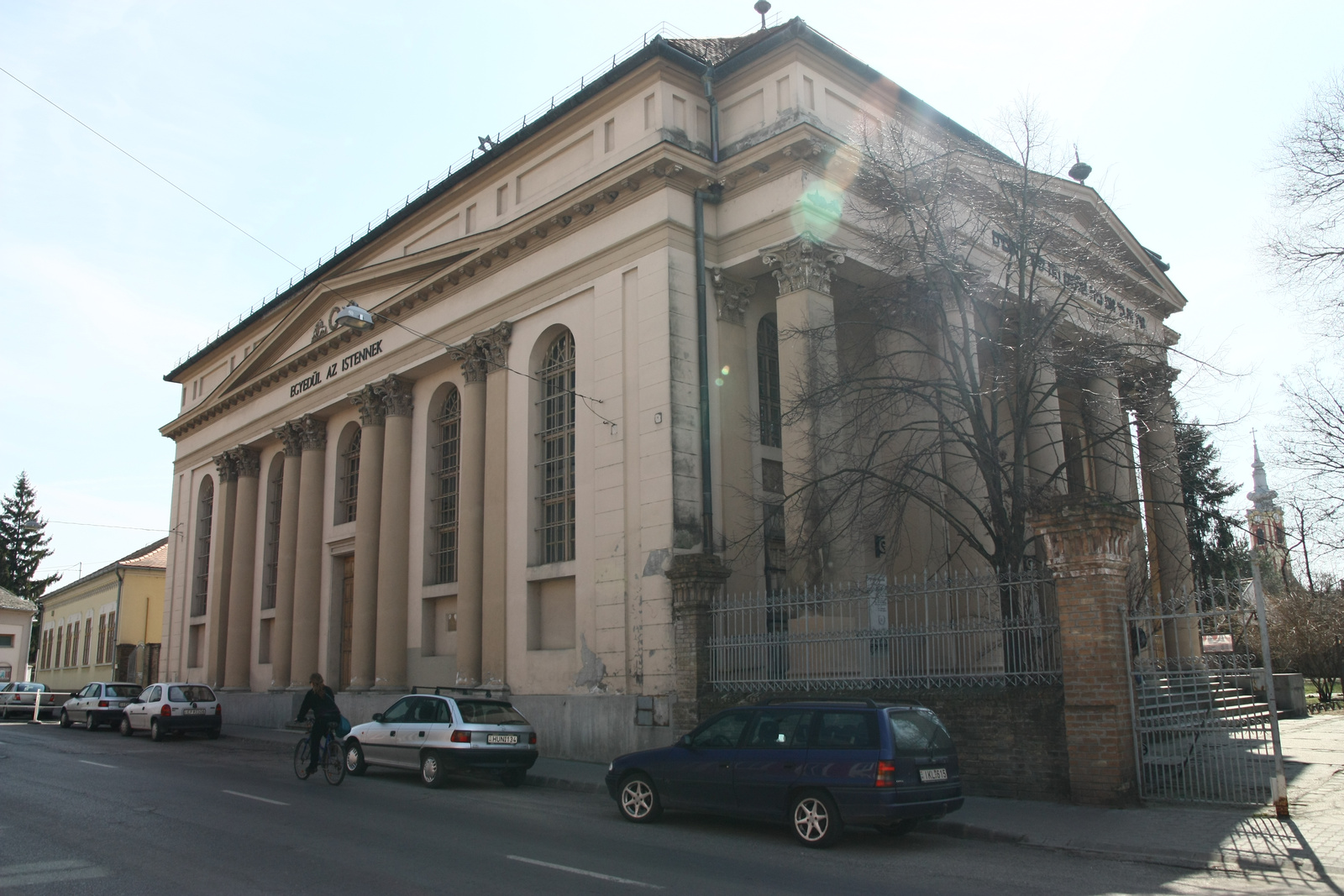 Zsinagóga (Baja, Munkácsy Mihály u. 9 .) This is a photo of a monument in Hungary, Identifier: 2113